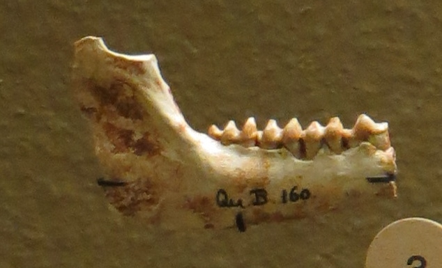 Fossil of Tapirulus - Took the picture at Natural History Museum, Basel